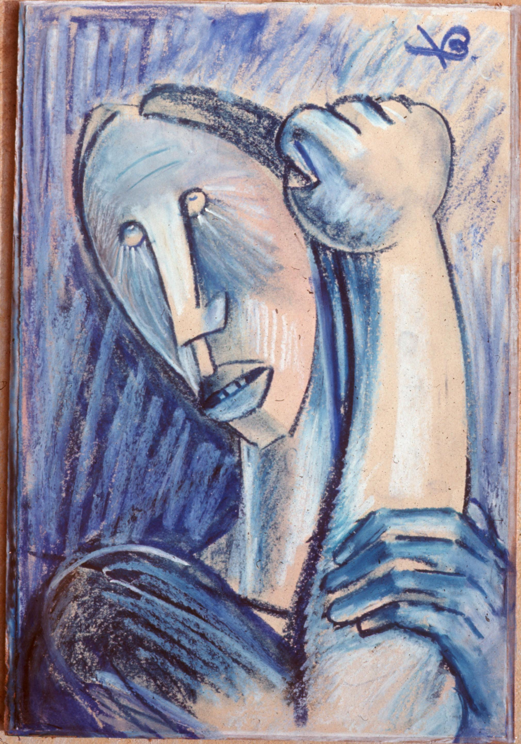 peinture de Béla Vörös (1899-1983)